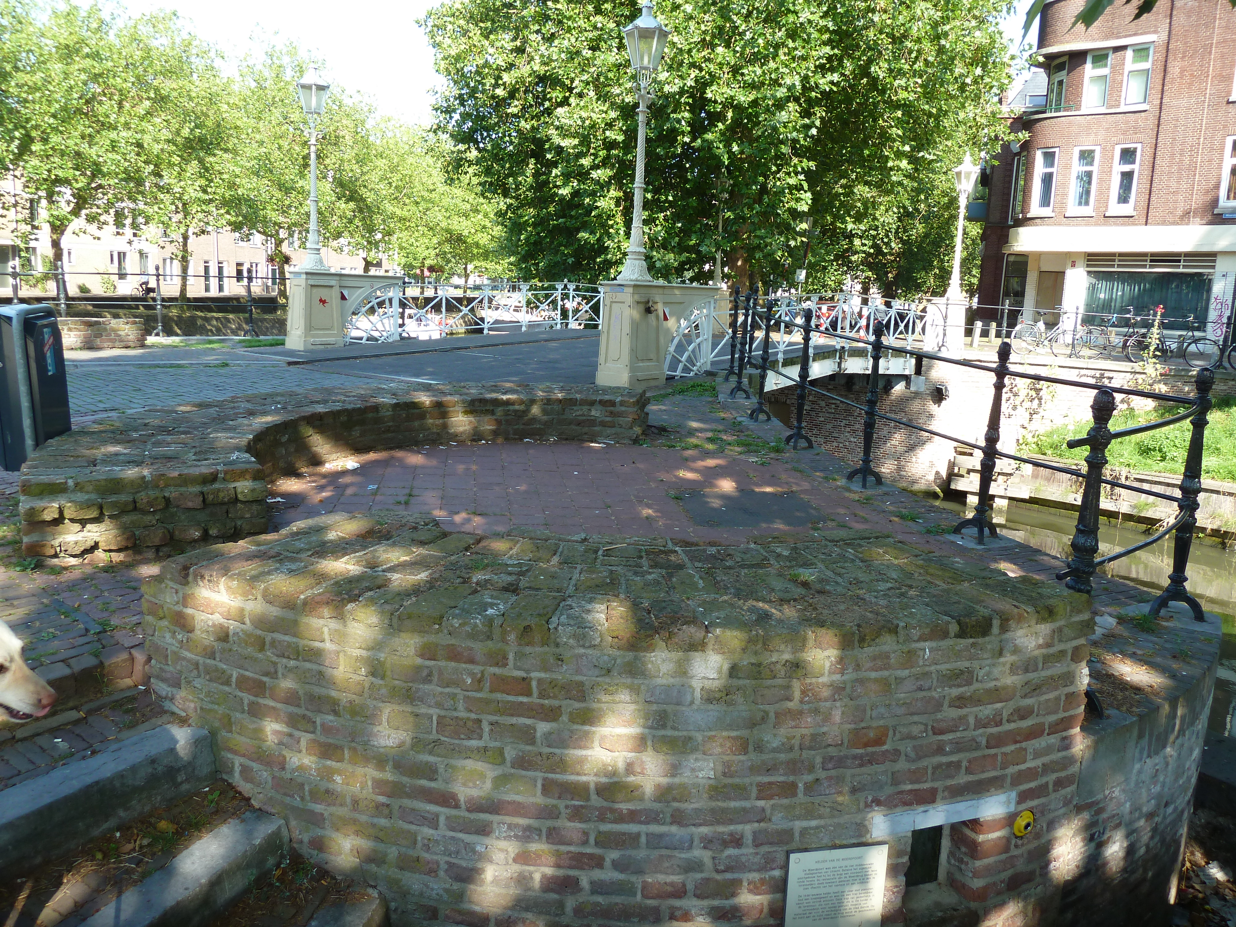 Restant van Weerdpoort met daar achter de Weerdbrug voor voetgangers en fietsers, Weerdsingel, Stadsbuitengracht, Utrecht, NL.